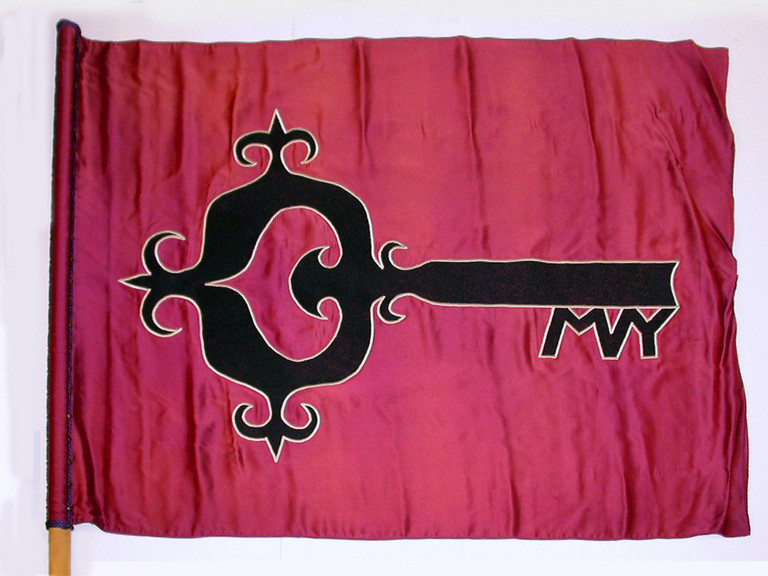 Munkkivuoren yhteiskoulun lippu.